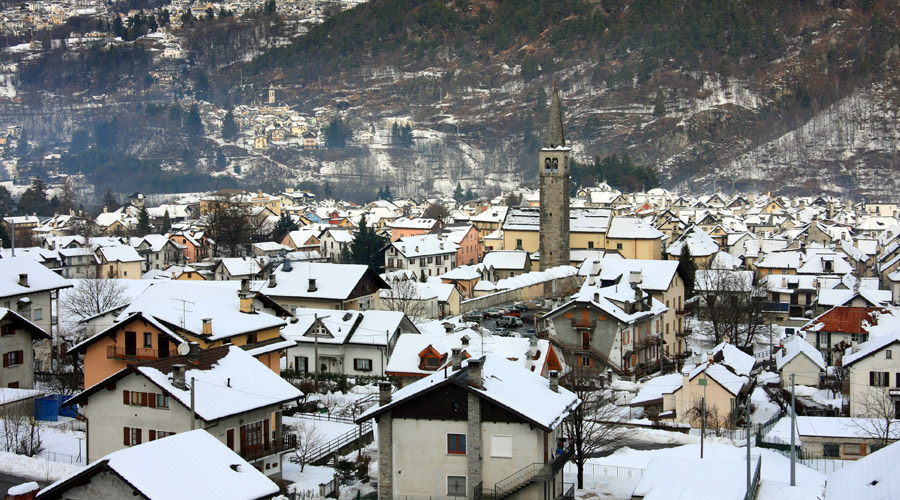 Panorama invernale di Malesco (VB)